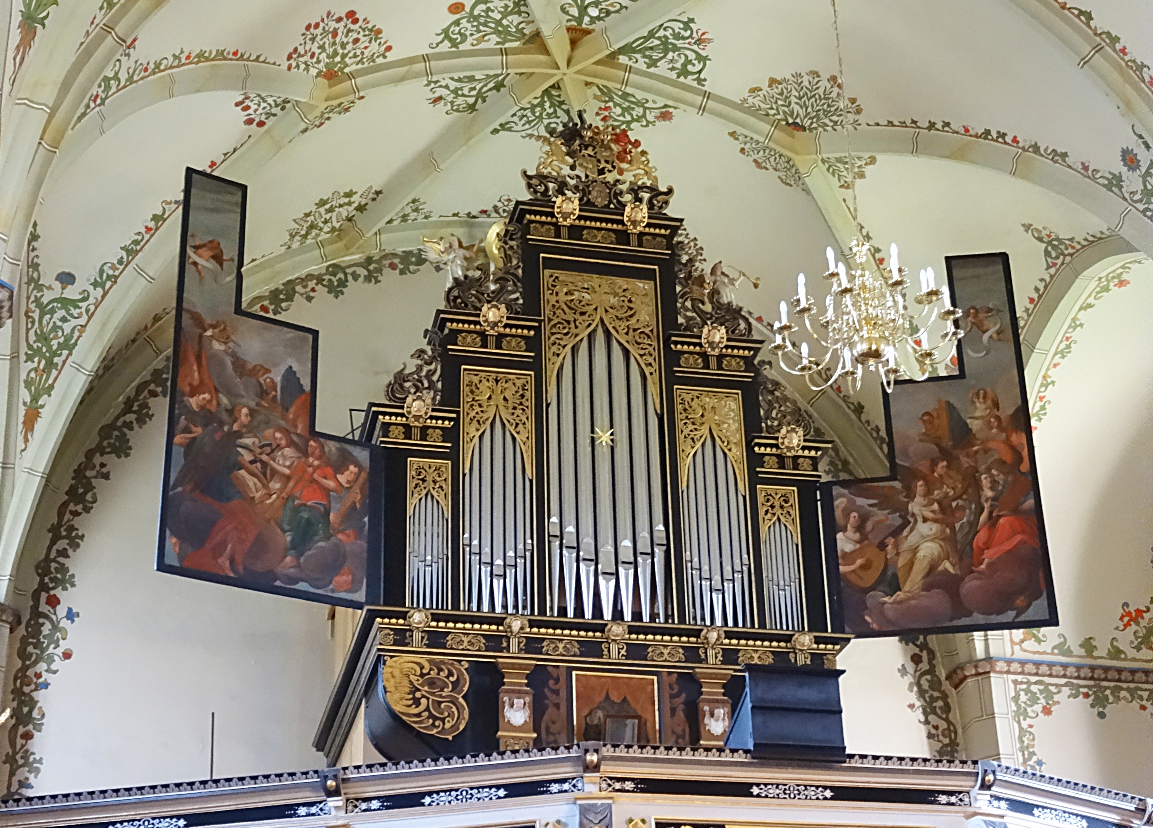 Die Orgel der Bergkirche Sankt Marien (Schleiz) wurde von Bernhard Kutter (Ruhla) 2004–7 neu erbaut (II/P23+3). Das Renaissanceprospekt stammt von der 1638 durch Jakob Schädlich aus Joachimsthal (Böhmen) erbauten Orgel